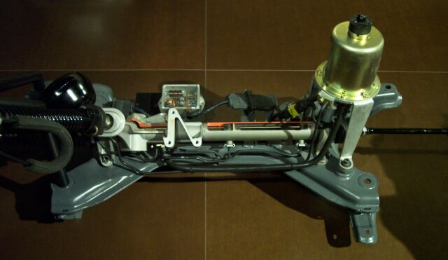 Servolenkung, eigenes Bild, GFDL